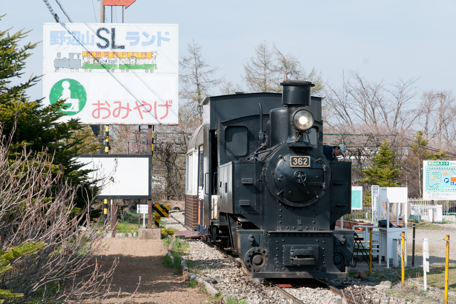 「野辺山SLランド」、長野県南佐久郡南牧村。